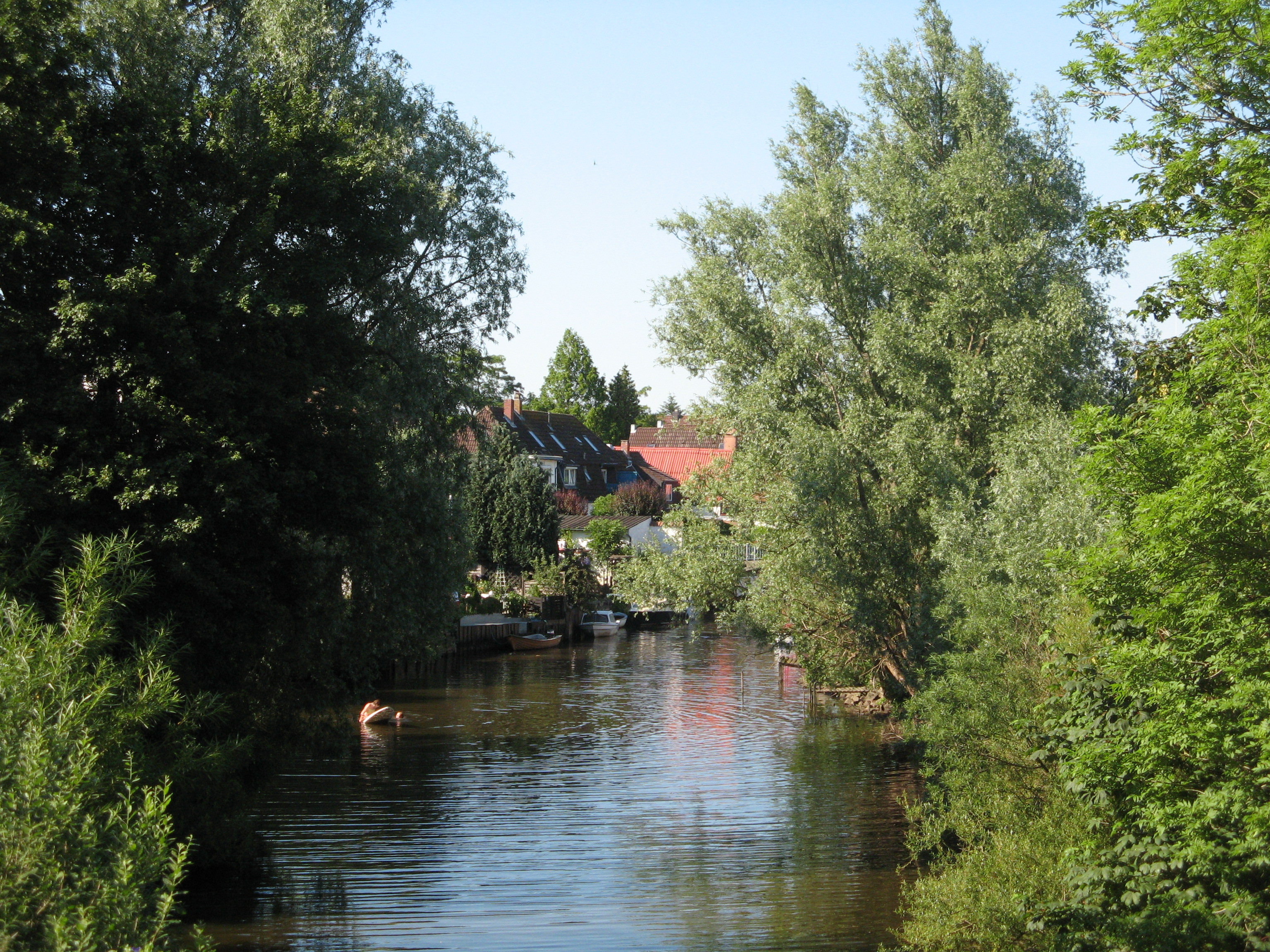 Canal in Friedrichstadt